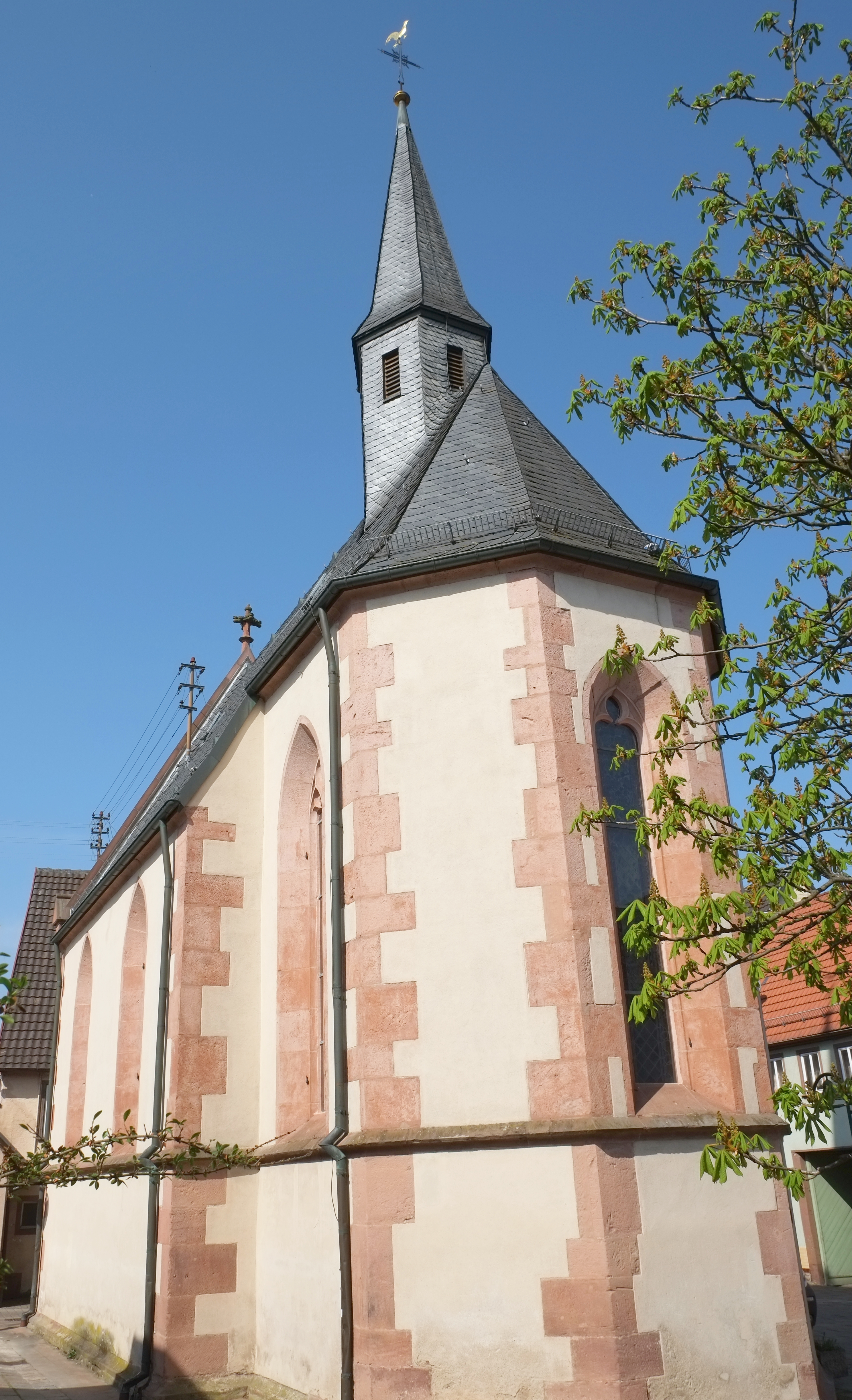 Katharinenkapelle in Külsheim im Main-Tauber-Kreis (Baden-Württemberg, Deutschland)